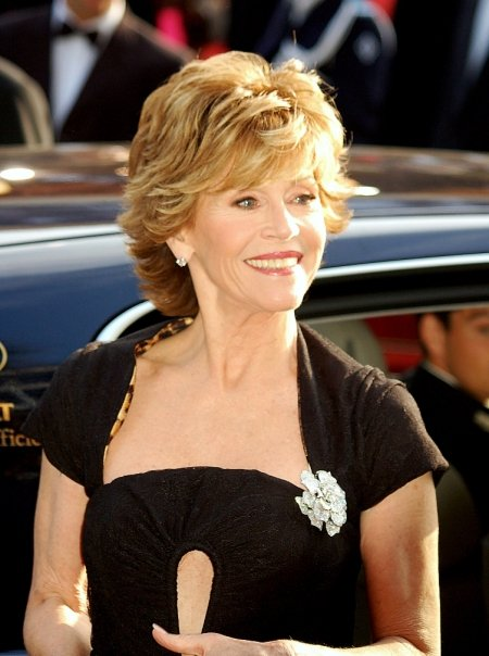 Jane Fonda at the Cannes Film Festival premiere of Promise Me This.